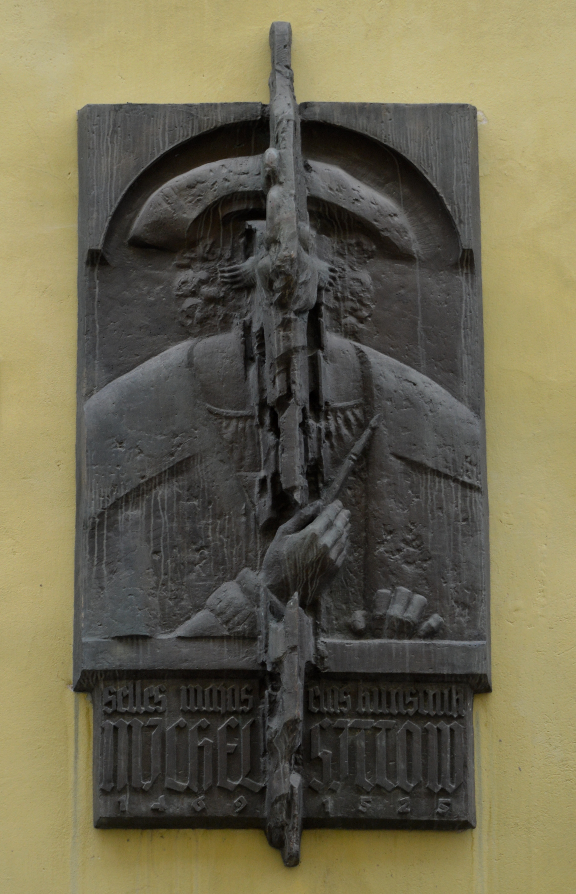 Gedenktafel Michel Sittow Raderstraße 22